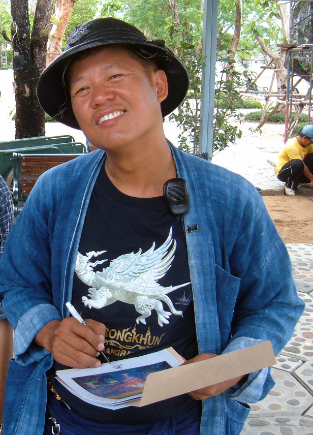 Thai artist Chalermchai Kositpipat at Wat Rong Khun in Chiang Rai, Thailand.